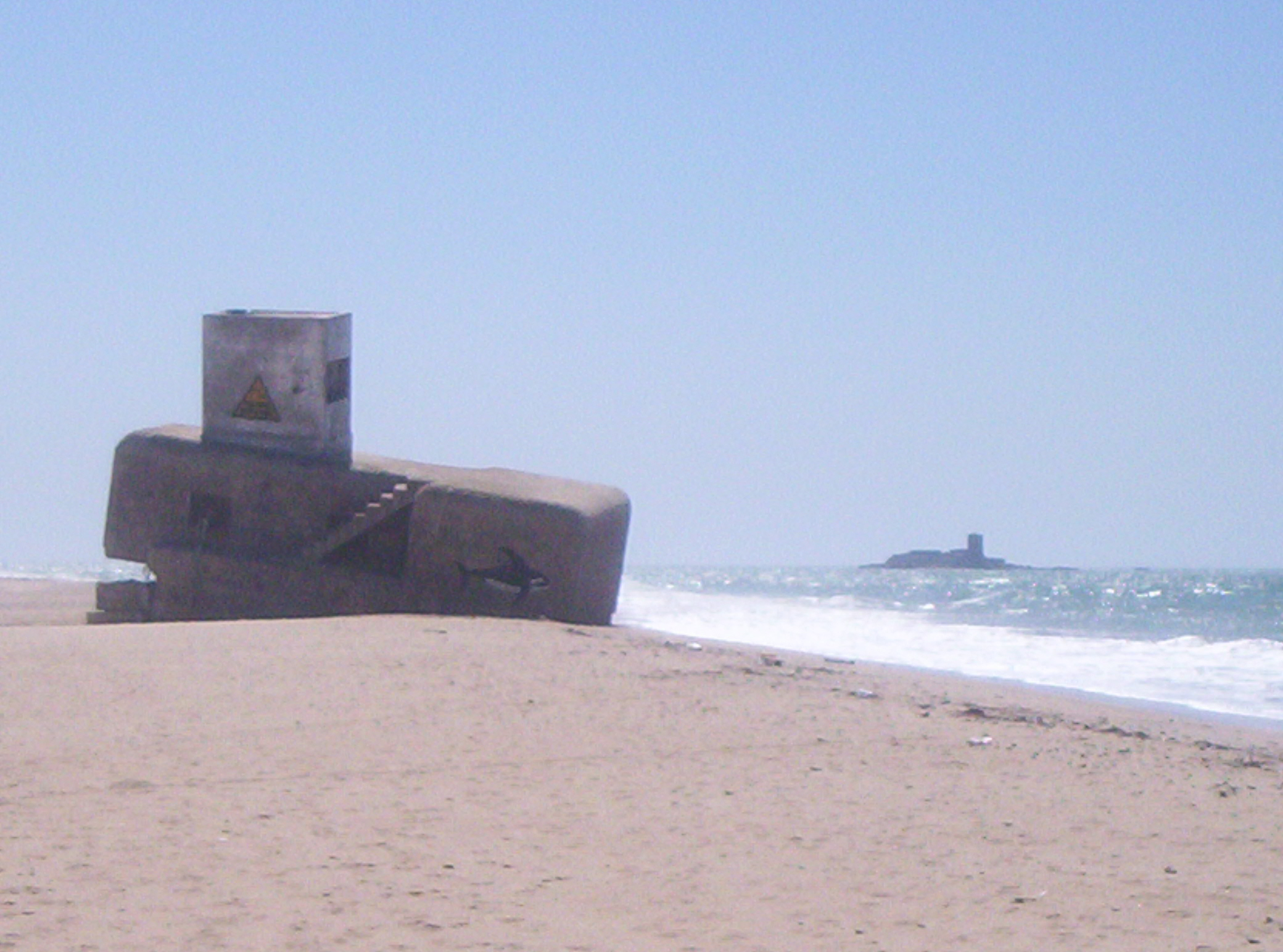 Foto, al fondo, del castillo de Sancti Petri (Cádiz, España) y de uno de los búnkeres de la playa del Castillo, en primer plano.